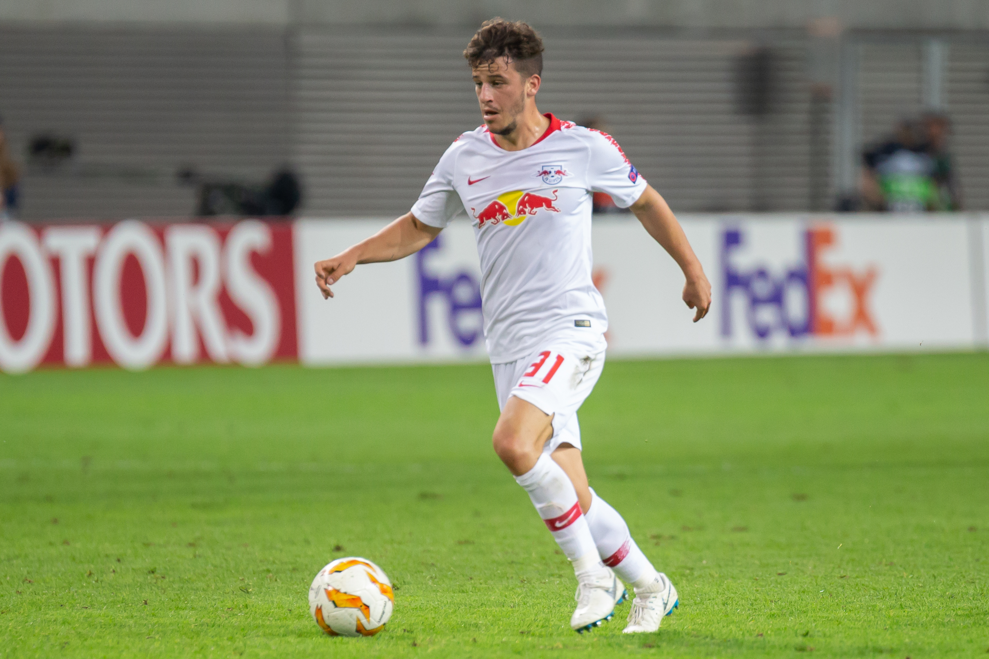 Diego Demme (RB Leipzig, 31); Freisteller, Einzelbild, Aktion, action